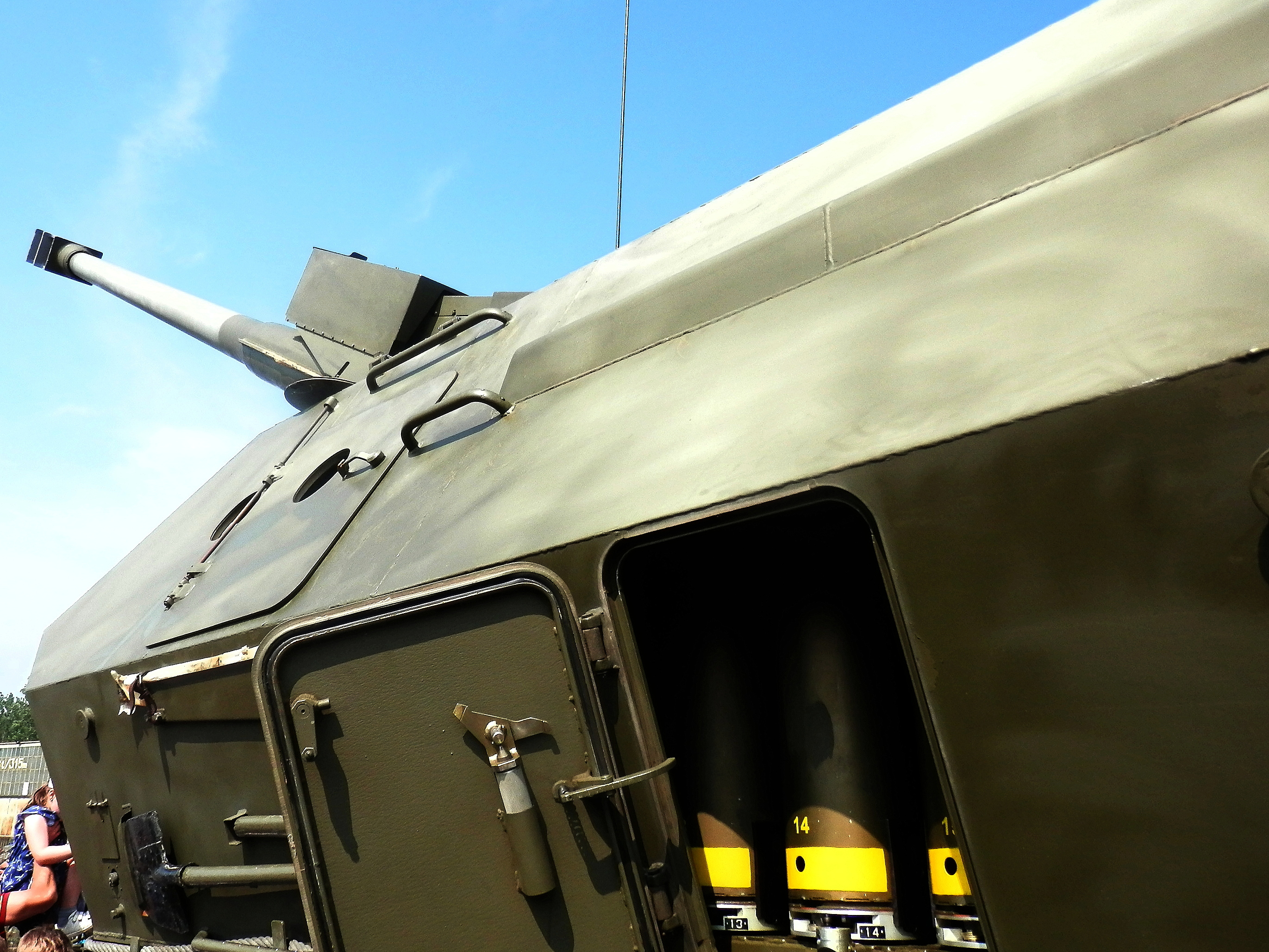 7.jún 2019. Deň detí, organizovaný vojakmi na letisku. 155 mm samohybná kanónová húfnica Zuzana. Mesto Prešov. Slovensko.